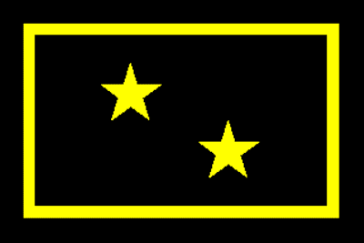 Bandiera Capo Milizia Volontaria di Sicurezza Nazionale